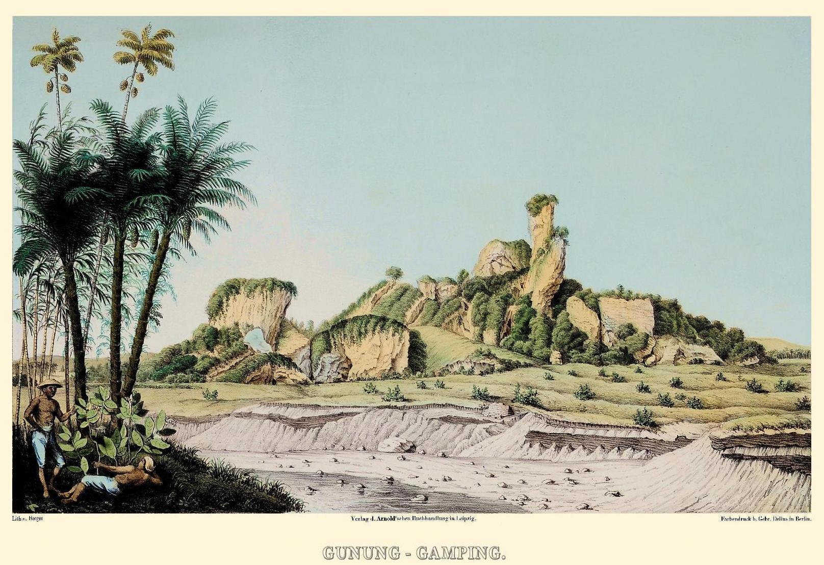 Gunung Gamping